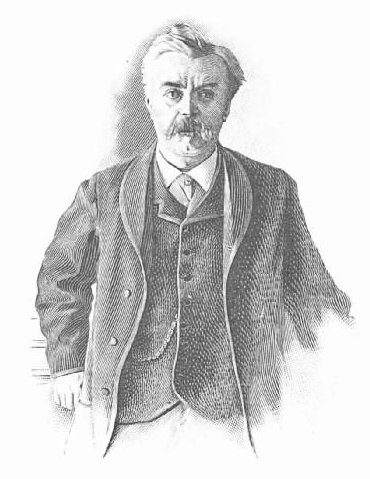 Portrait de l'écrivain Léon Bloy